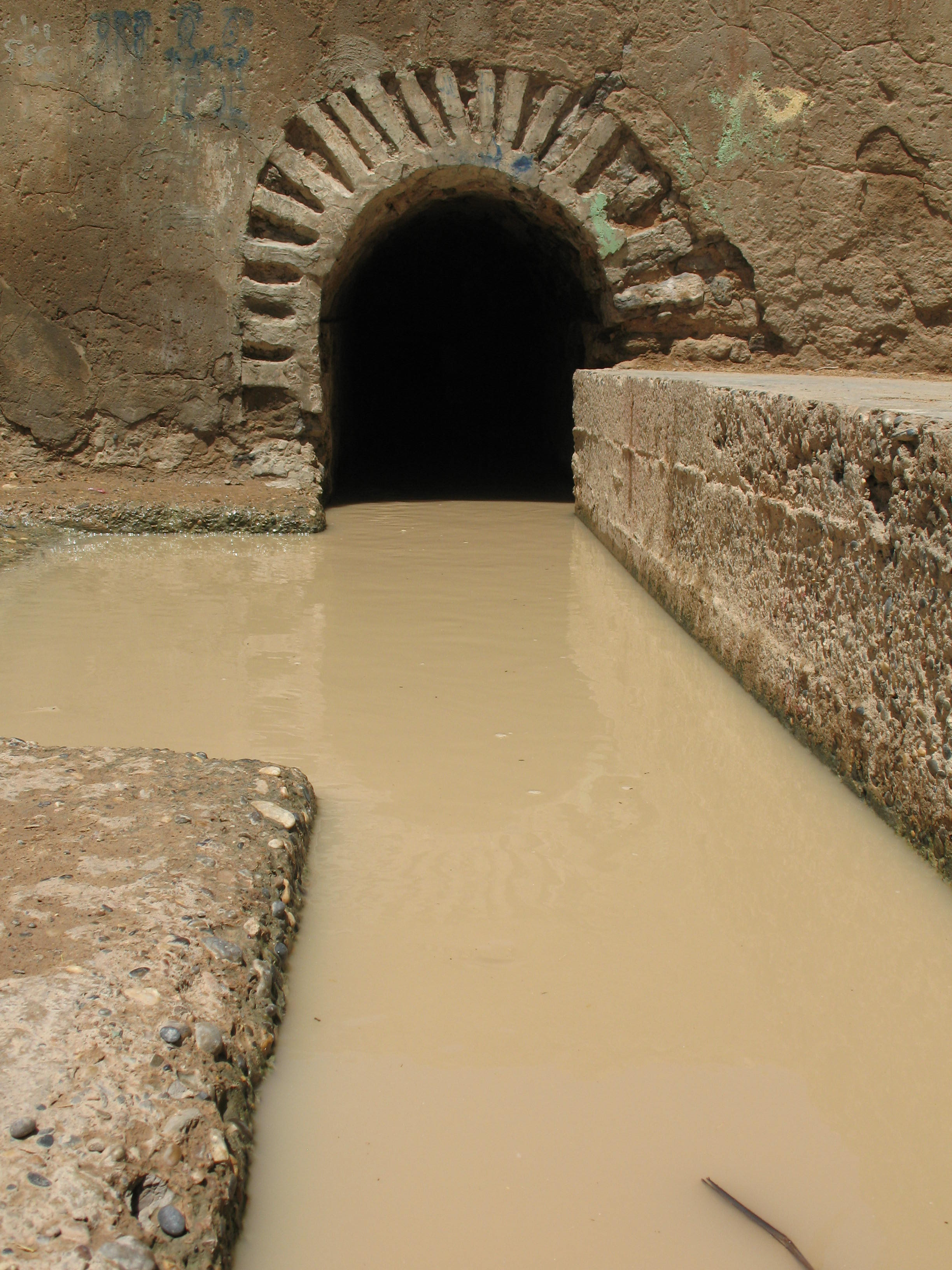 c'est là où sort la khettara de Haroun dans qsar Haroun à l'est de Rissani au Maroc